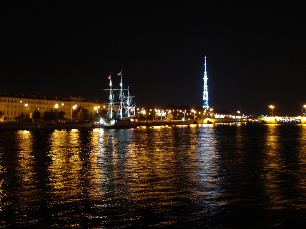 Телебашня ночью